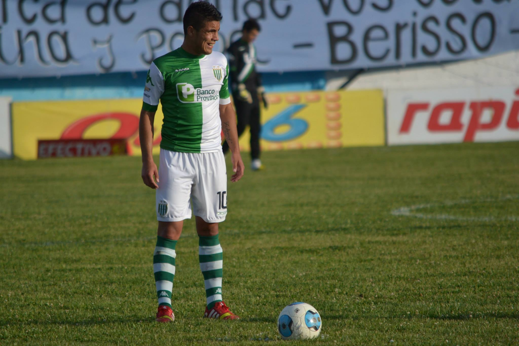 Jonathan Requena